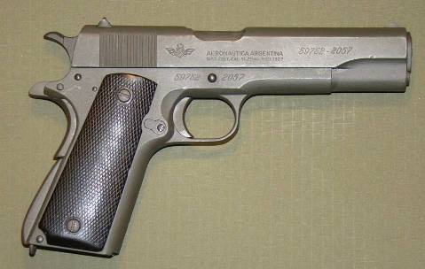 Pistola de aeronautica fosfatada.